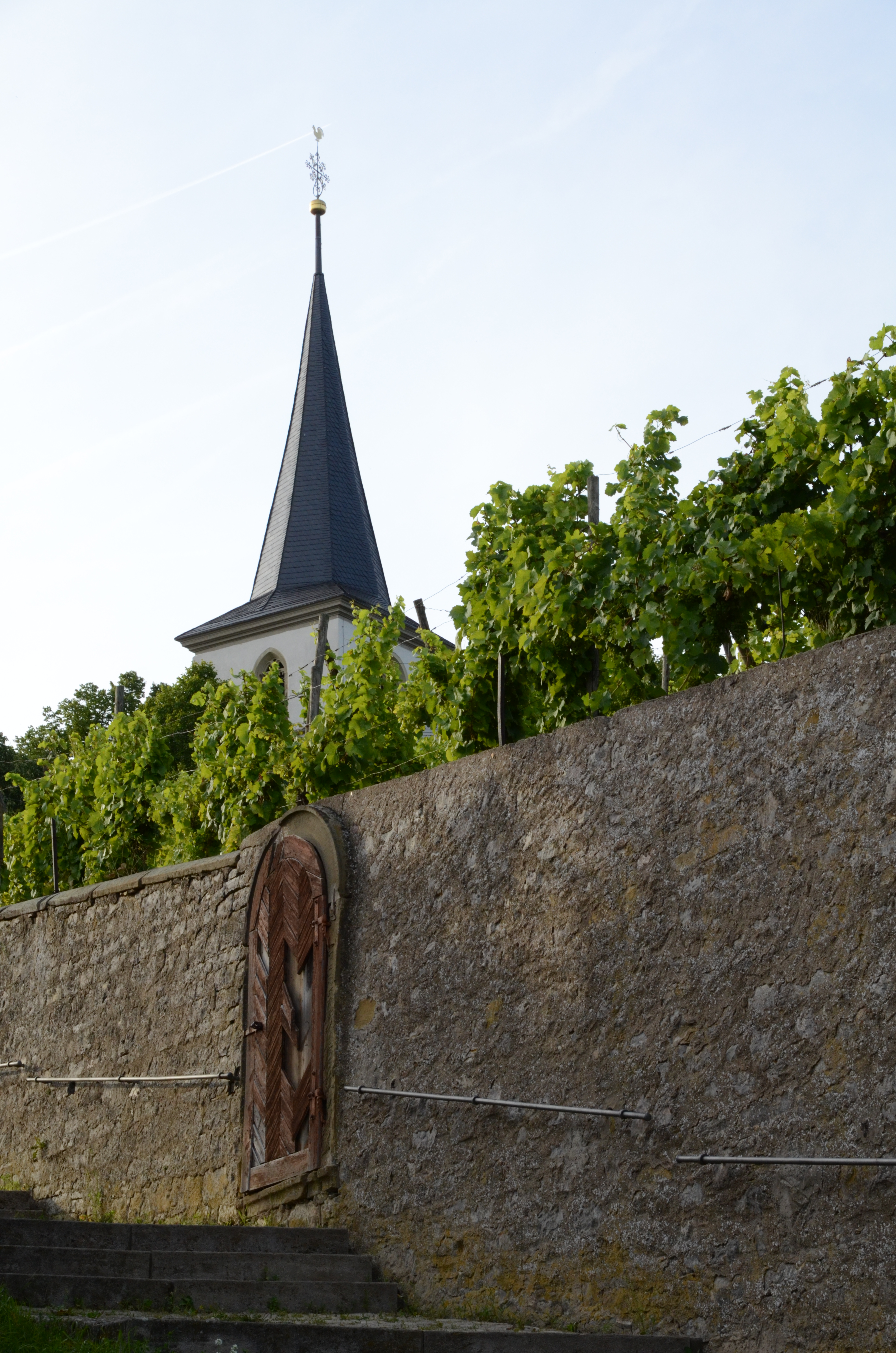 Wipfeld St. Johannes der Täufer